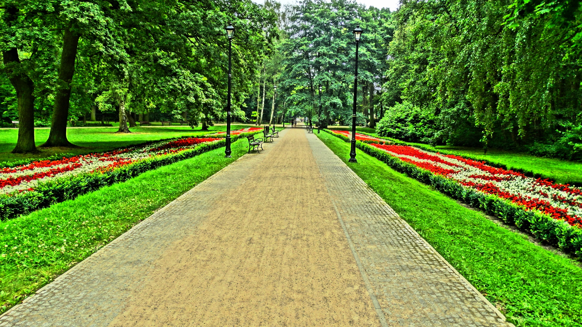 Świnoujście, park zdrojowy, 1827, 1939, po 1945